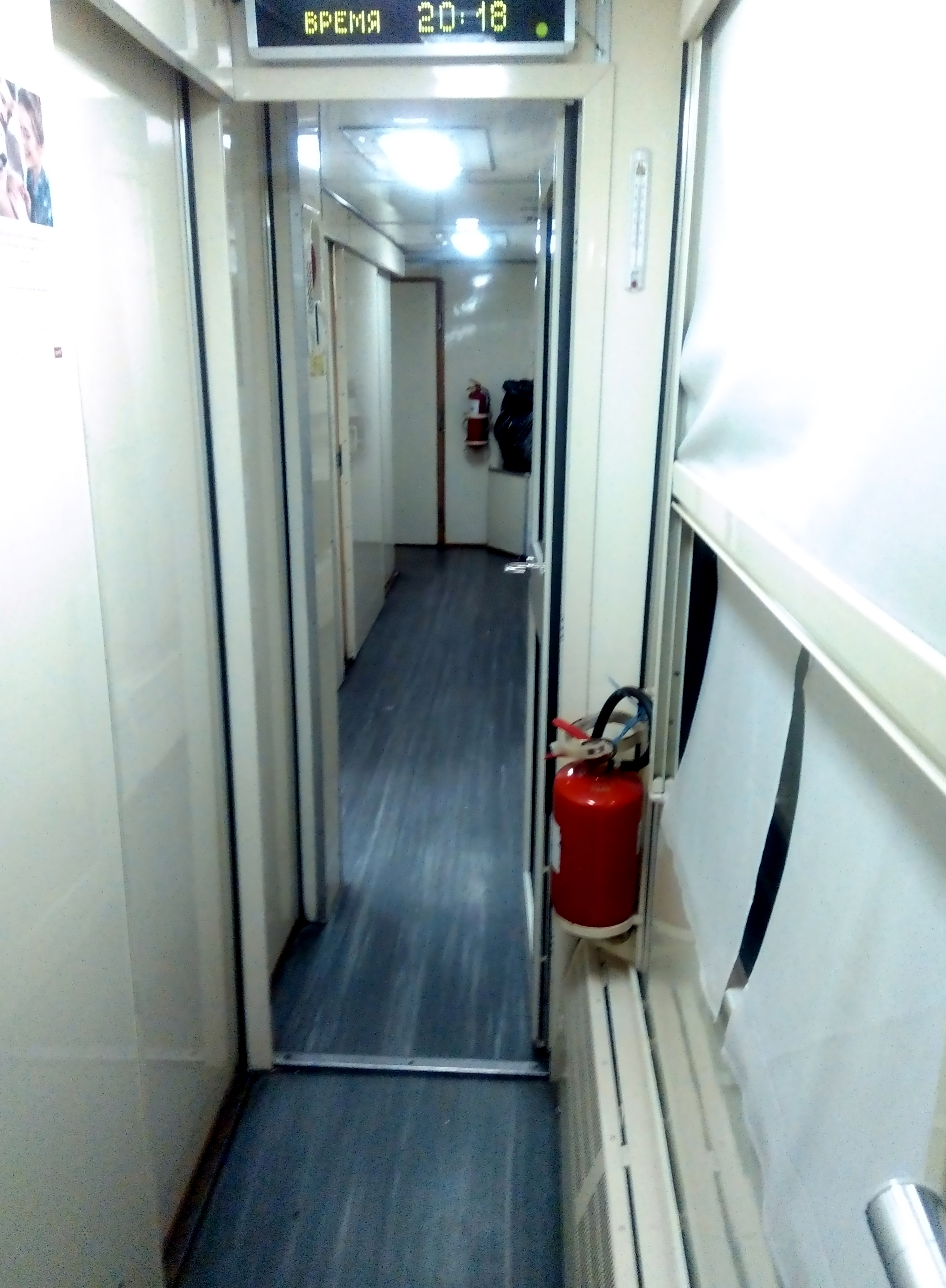 Штабной вагон российские железные дороги